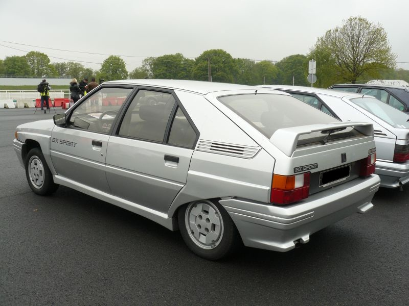 Français cadien: Montlhlery Avril 2012